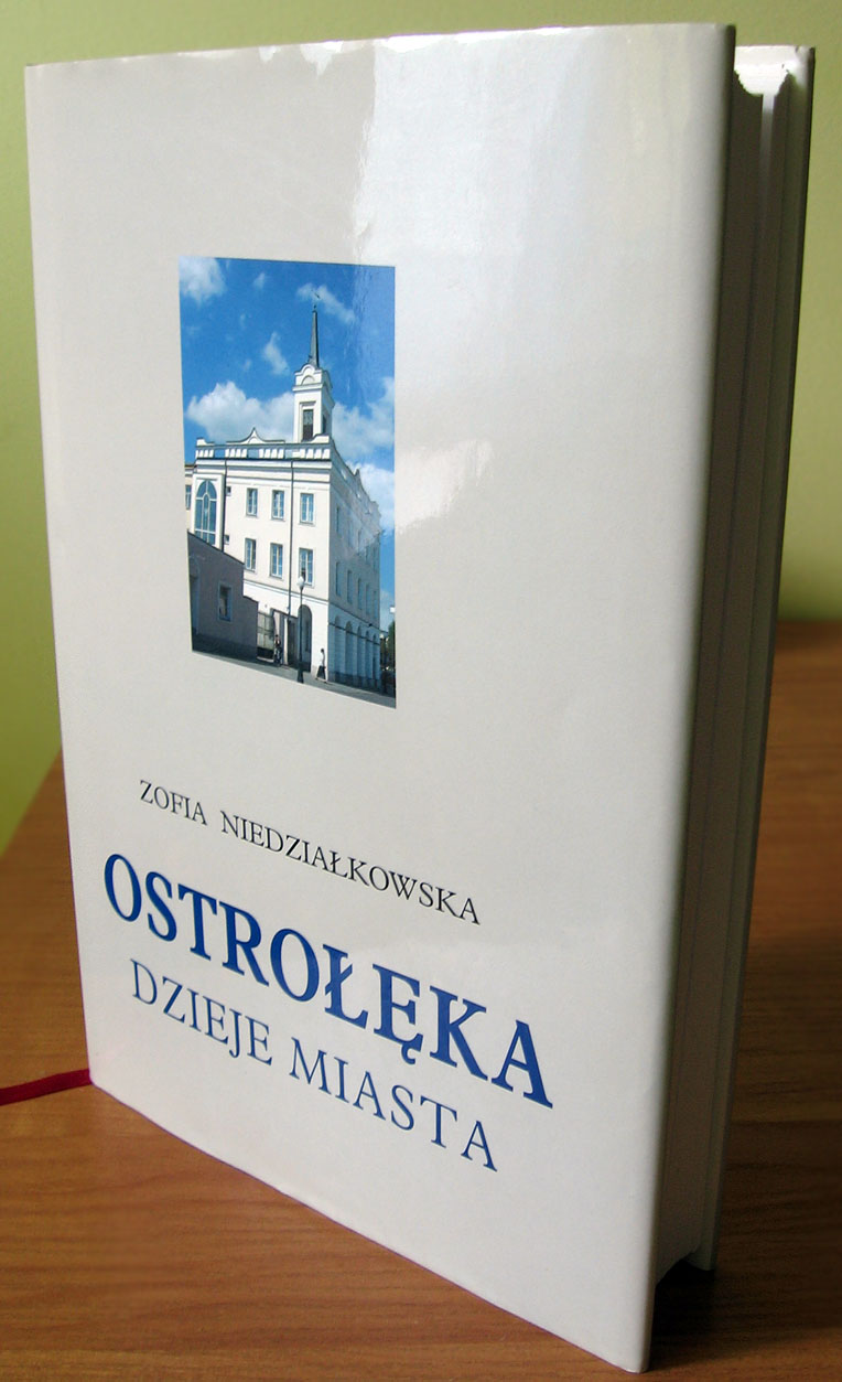 Monografia Ostrołęka. Dzieje Miasta Zofii Niedziałkowskiej.